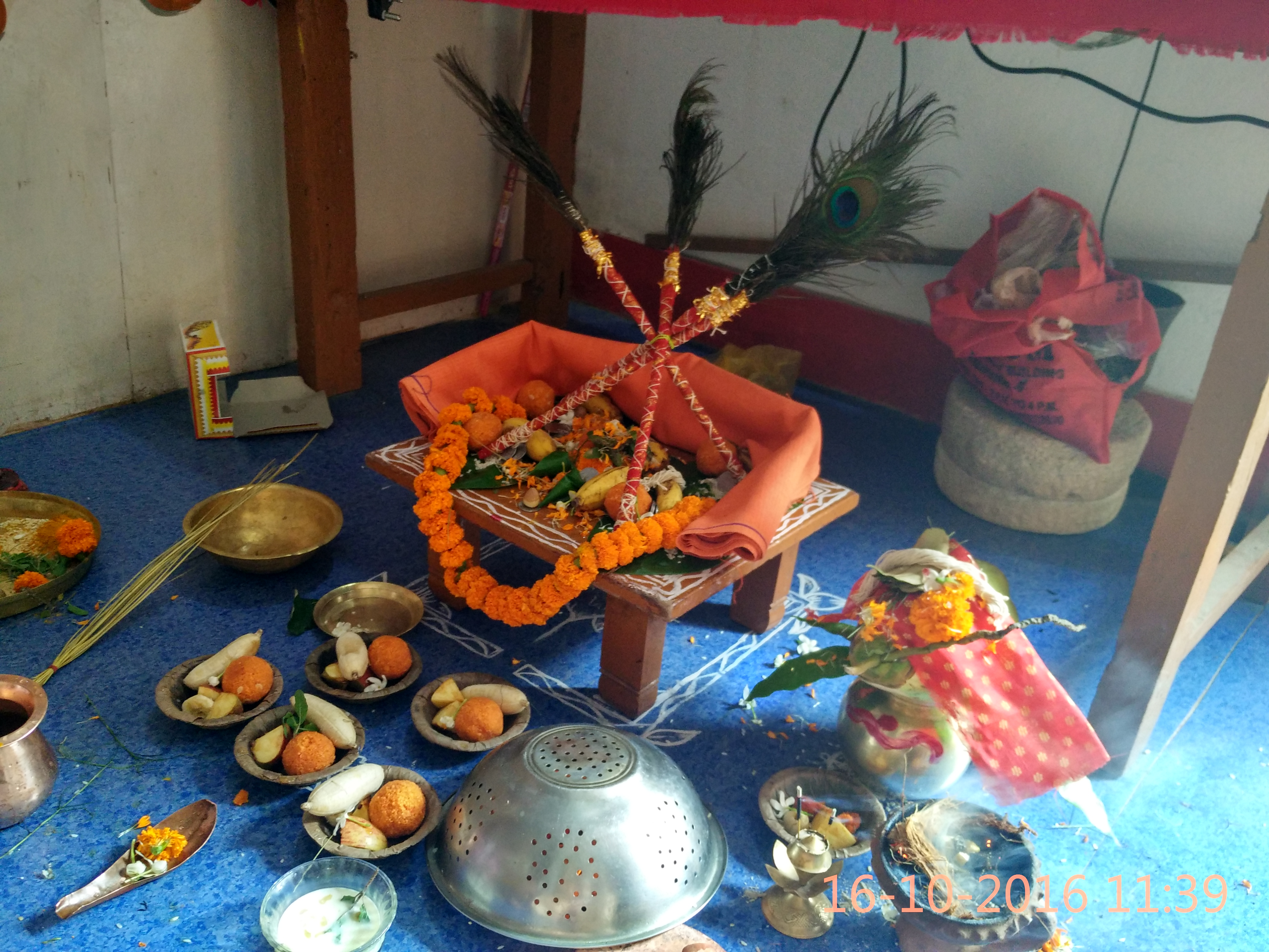 ଓଡ଼ିଆ: ସତ୍ୟନାରାୟଣ ପୂଜା